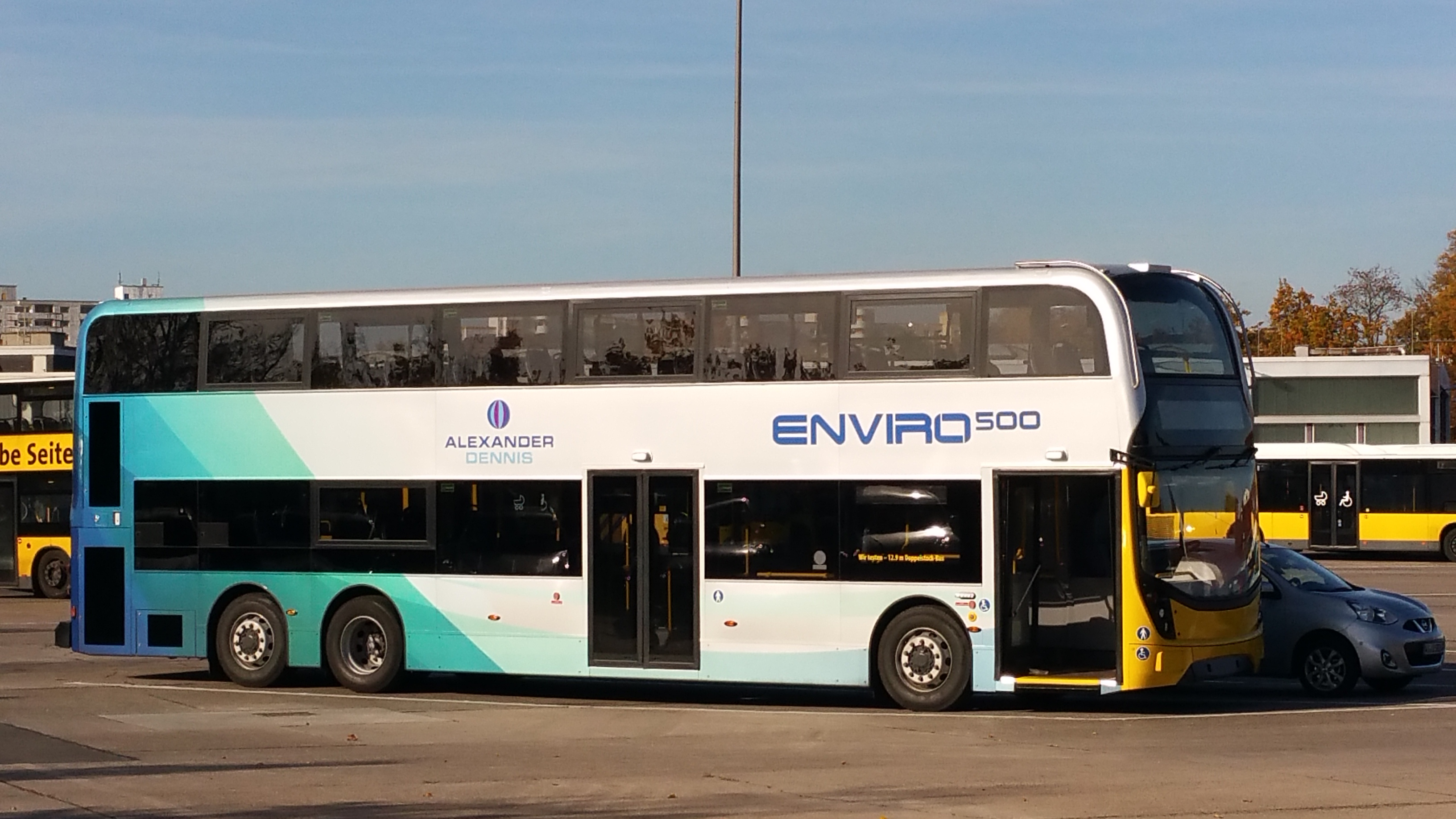 Testbus Enviro 500 für die BVG Oktober 2015 von Alexander Dennis. Leihgabe vom Hersteller